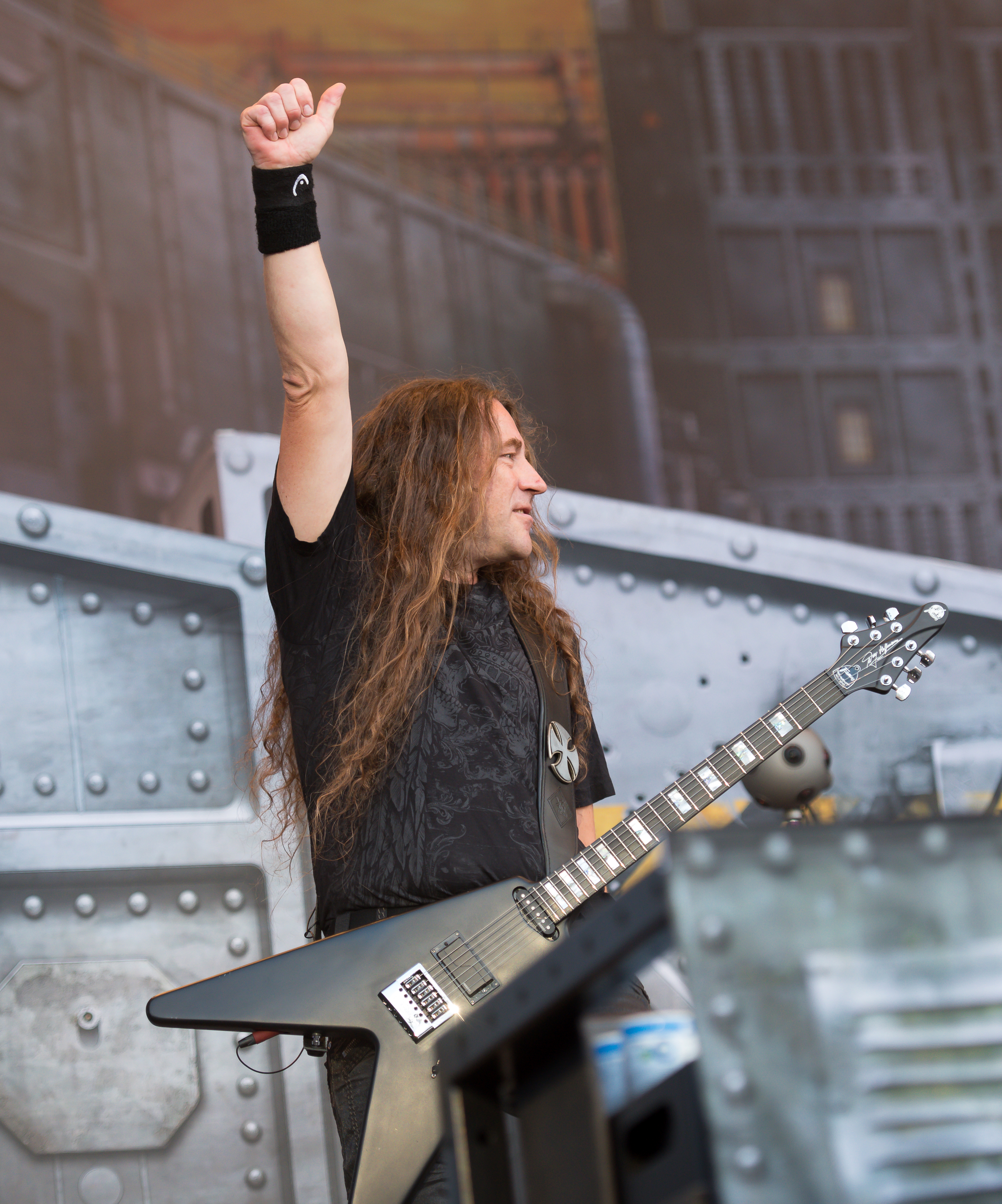 Accept beim Wacken Open Air 2017